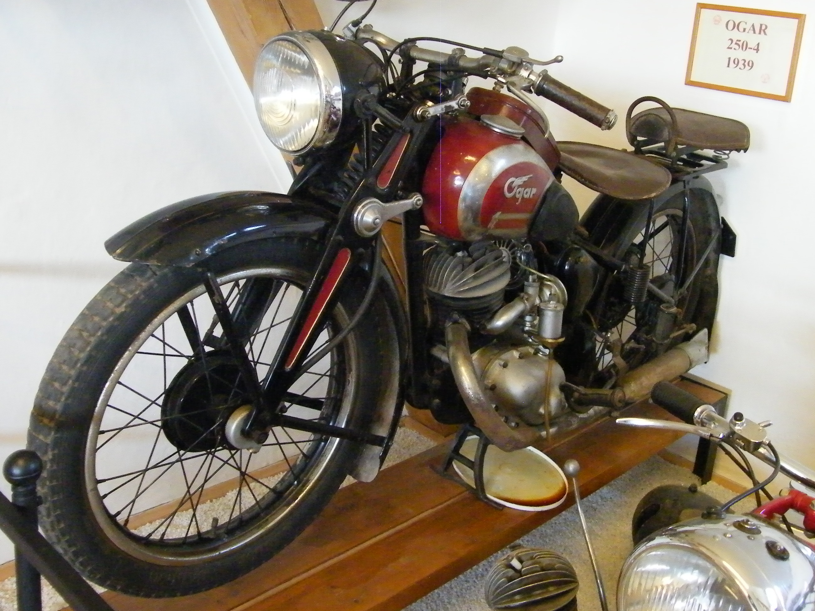 Ogar 4 (1939) - 250 ccm